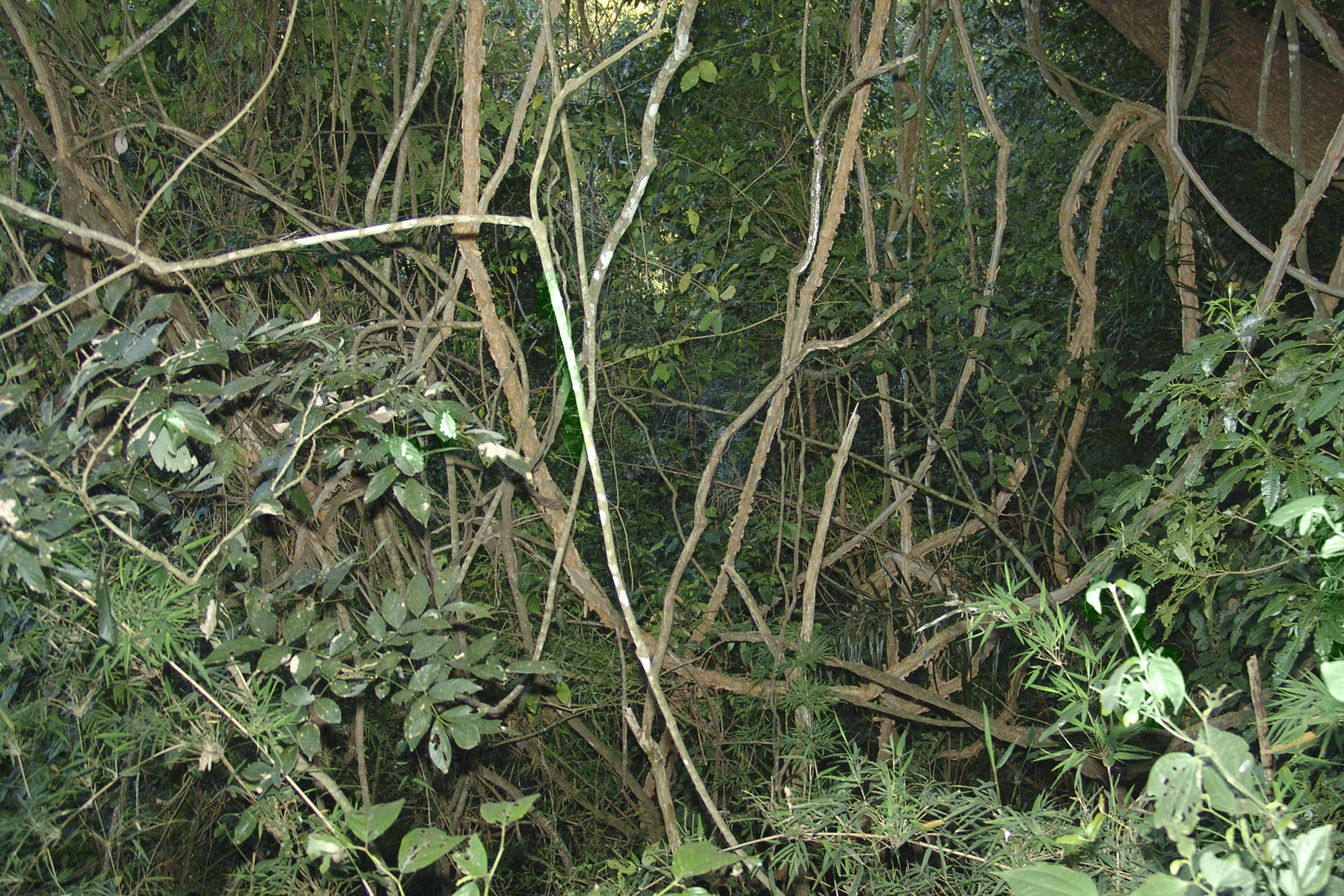 Cipoal (cipó), em Avaré, Brasil